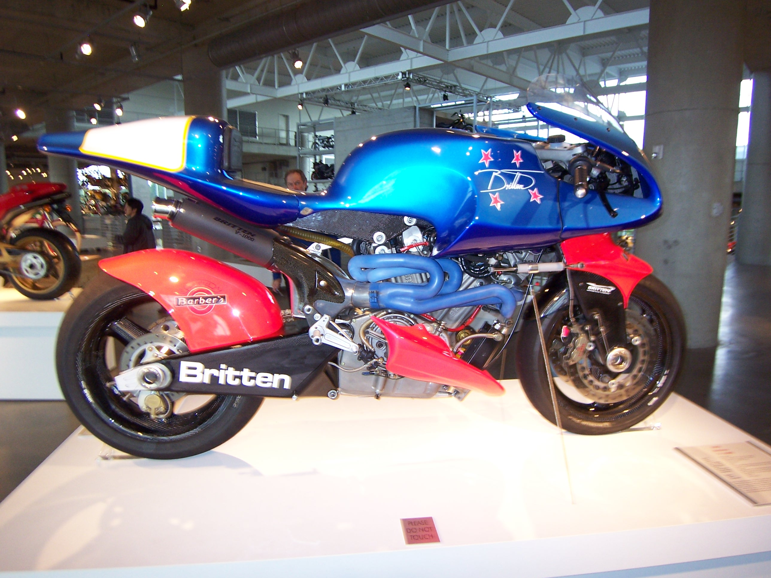 1996 Britten V-1000